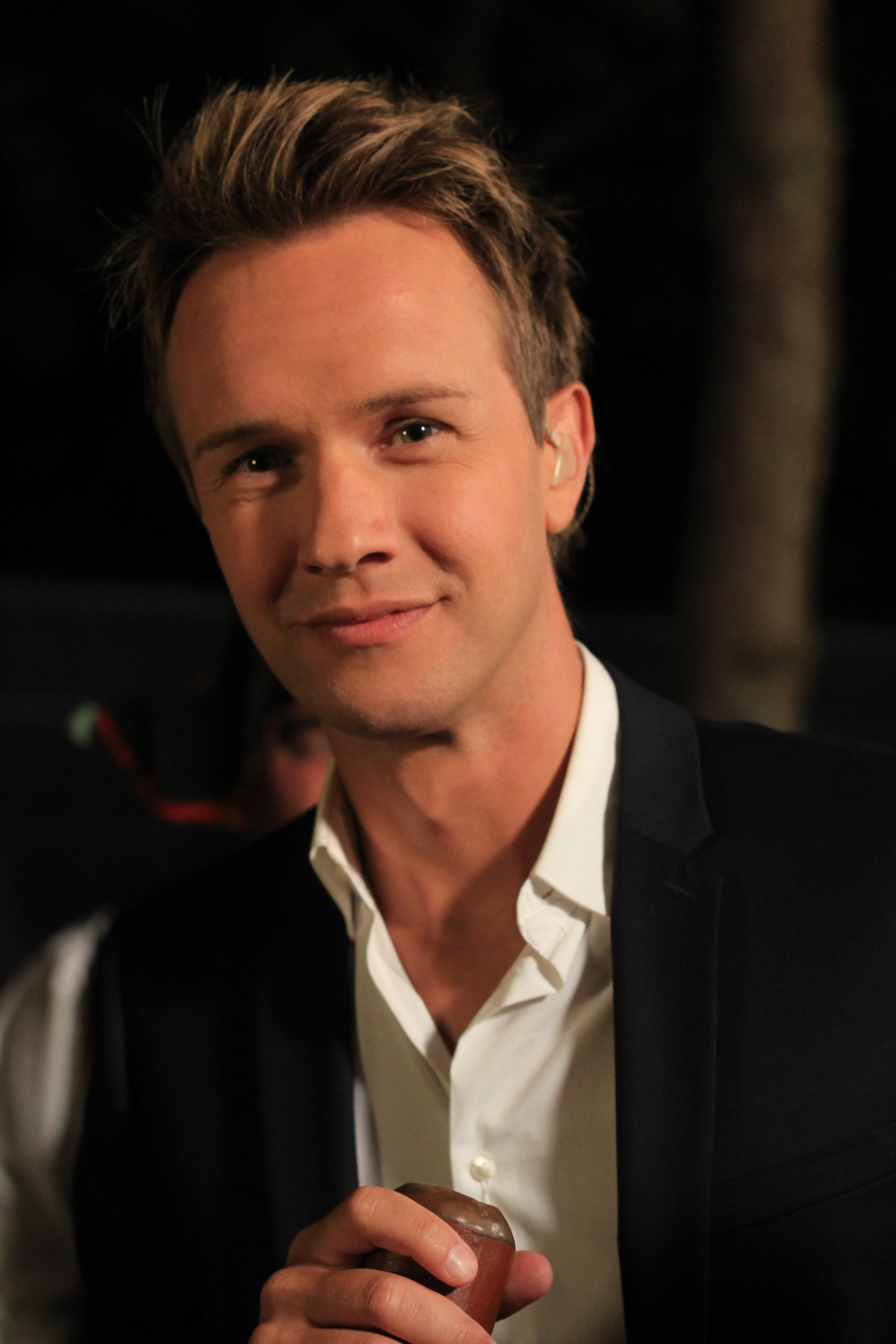 Cyril Féraud pendant le festival interceltique de Lorient 2016